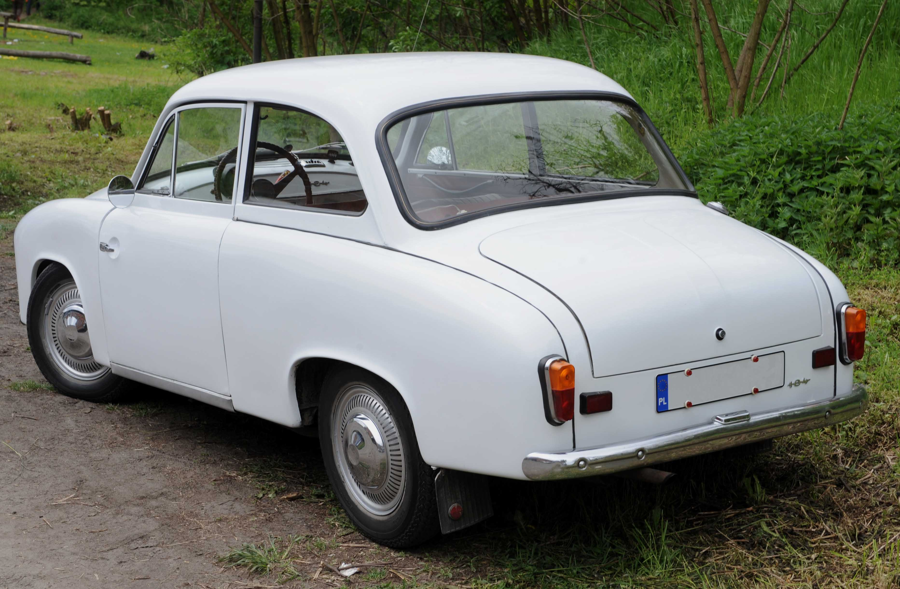 Samochód Syrena 104, widok w tyłu auta